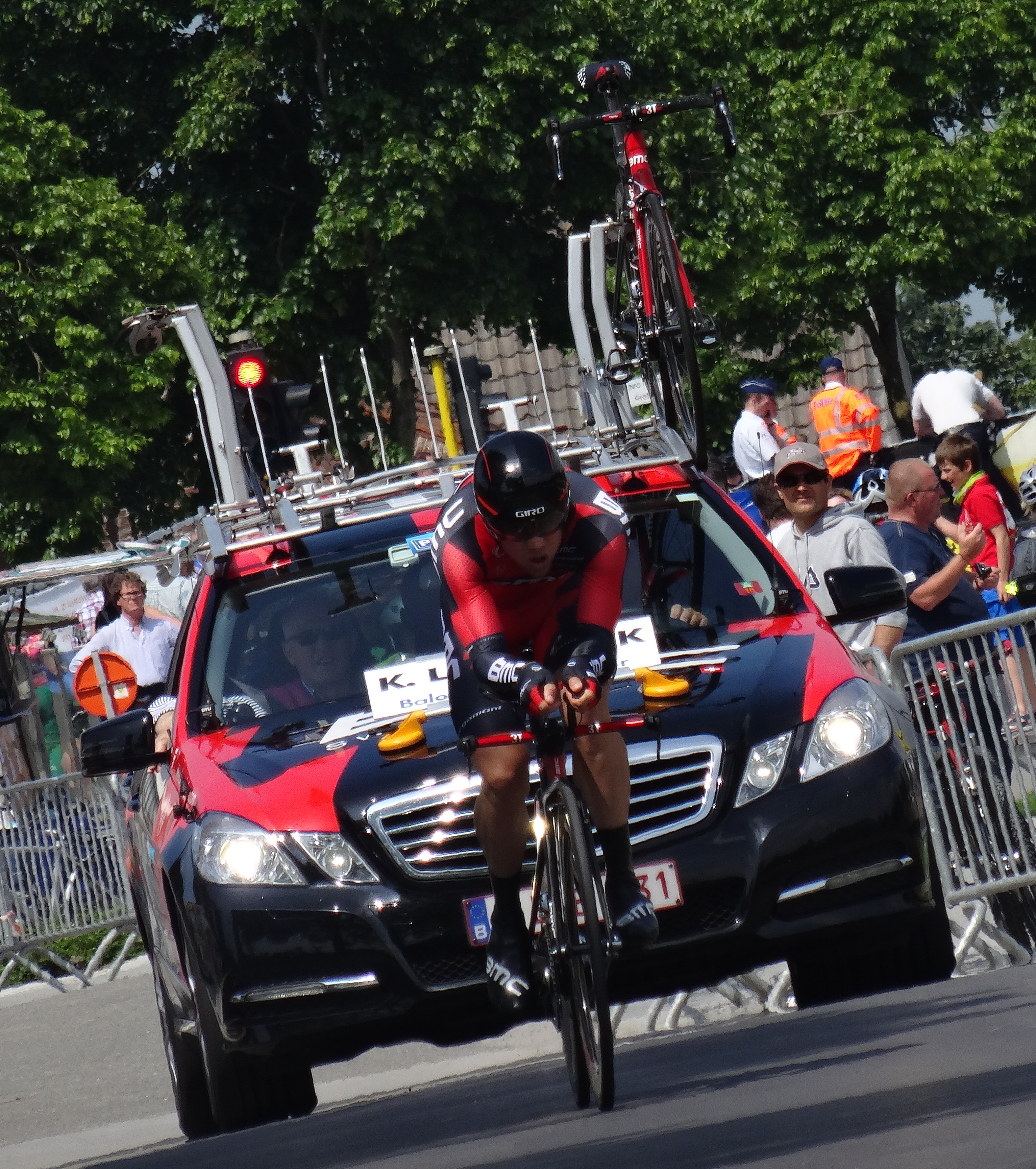 Reportage photographique réalisé le vendredi 30 mai à l'occasion du contre-la-montre individuel de la troisième étape du Tour de Belgique 2014 à Dixmude, Belgique.